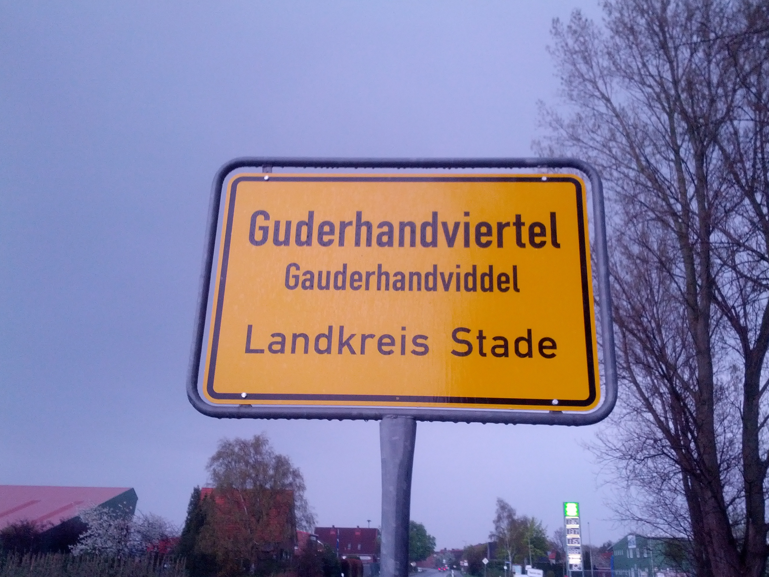 Ortsschild von Gauderhandviddel, Landkreis Stood, mit den Naam op Hoochdüütsch un op Plattdüütsch